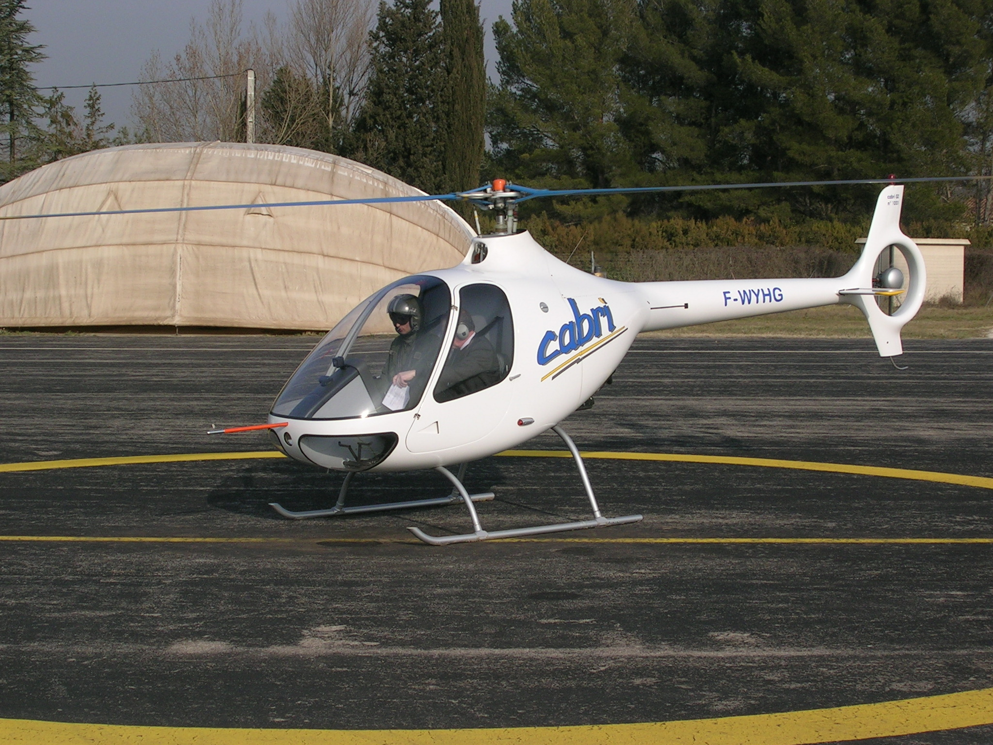 Helicoptère Cabri G2